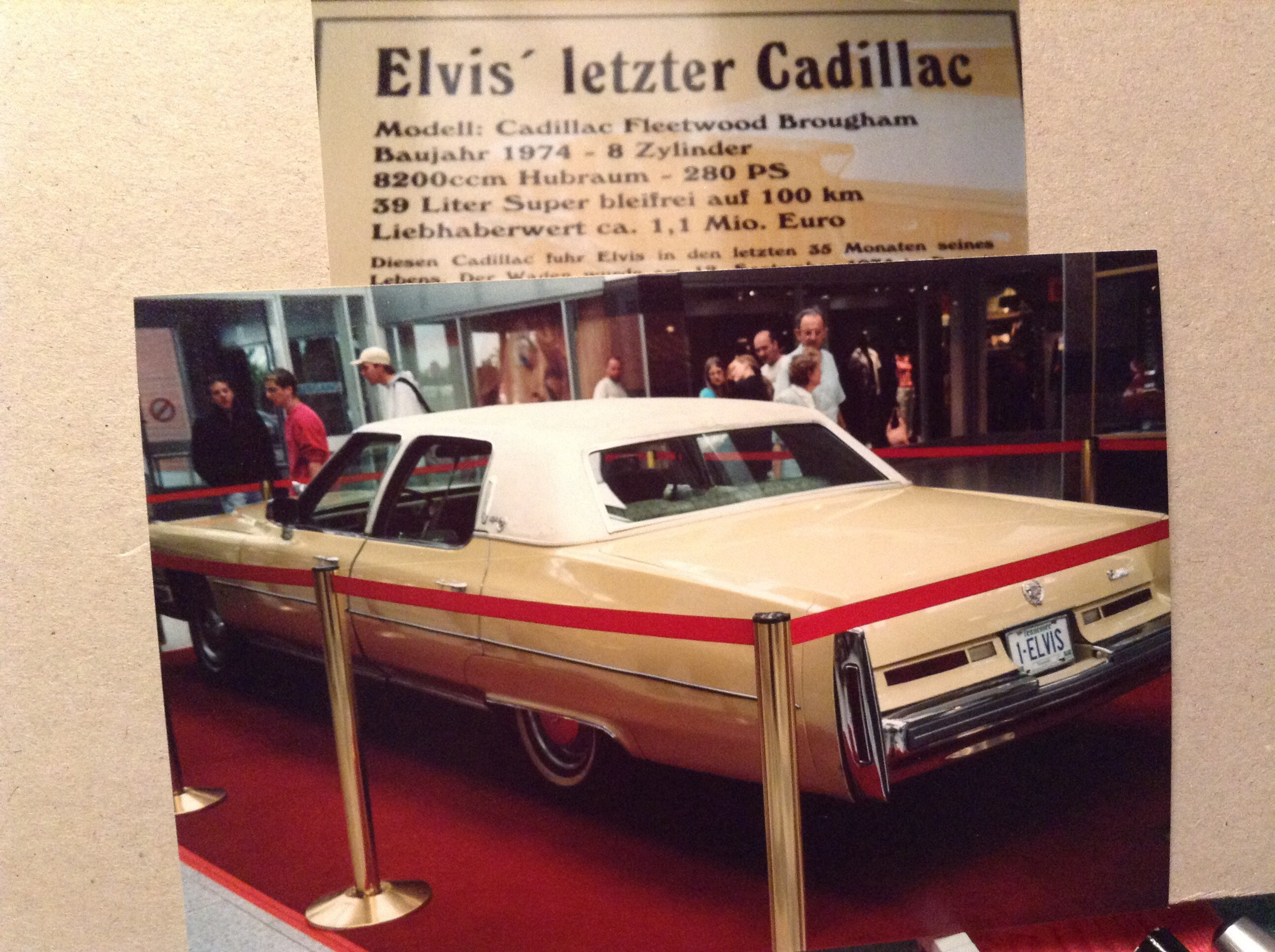 Elvis-Ausstellung 2003 in Leipzig im Einkaufszentrum Paunsdorf mit dem Cadillac Fleetwood